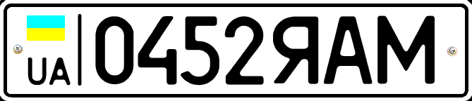 Автомобильный номер юридических лиц Украины, стандарт 1993 года